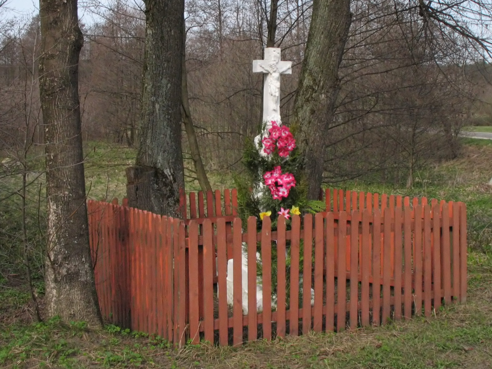 Nowe Brusno (Polska) - krzyż przydrożny wyk. przez M.Lubyckiego